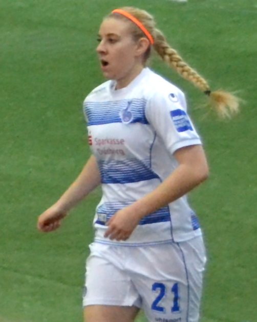 Selina Boveleth (MSV Duisburg) beim SAP Frauen-FußballCup 2017